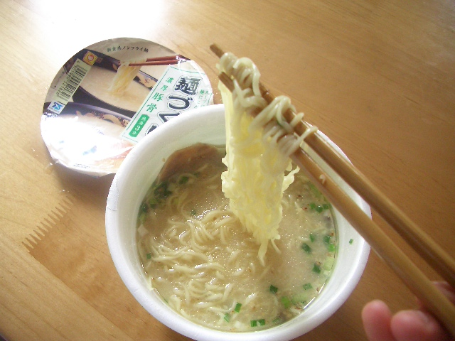 Instant lamian noodles